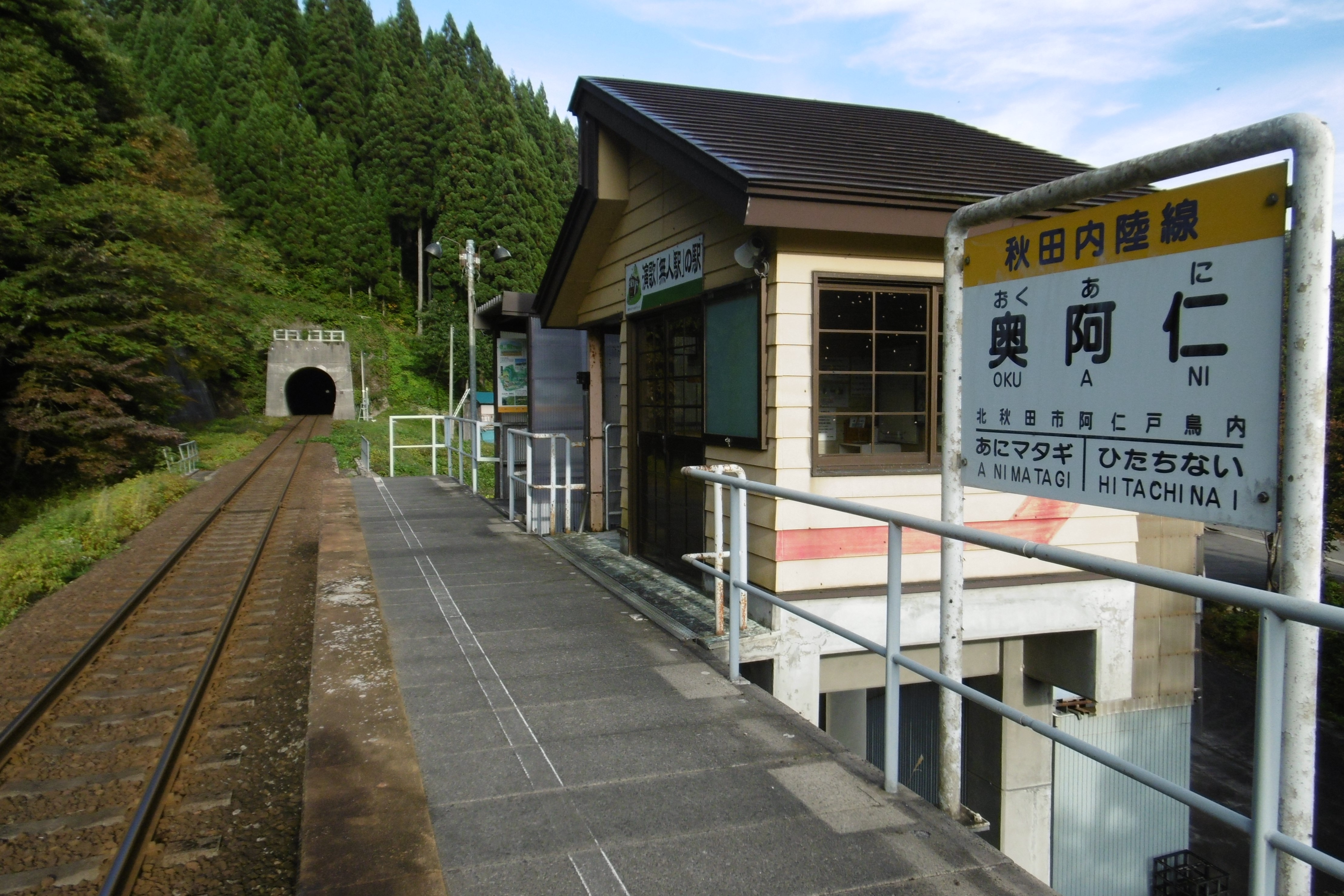 秋田内陸線 奥阿仁駅